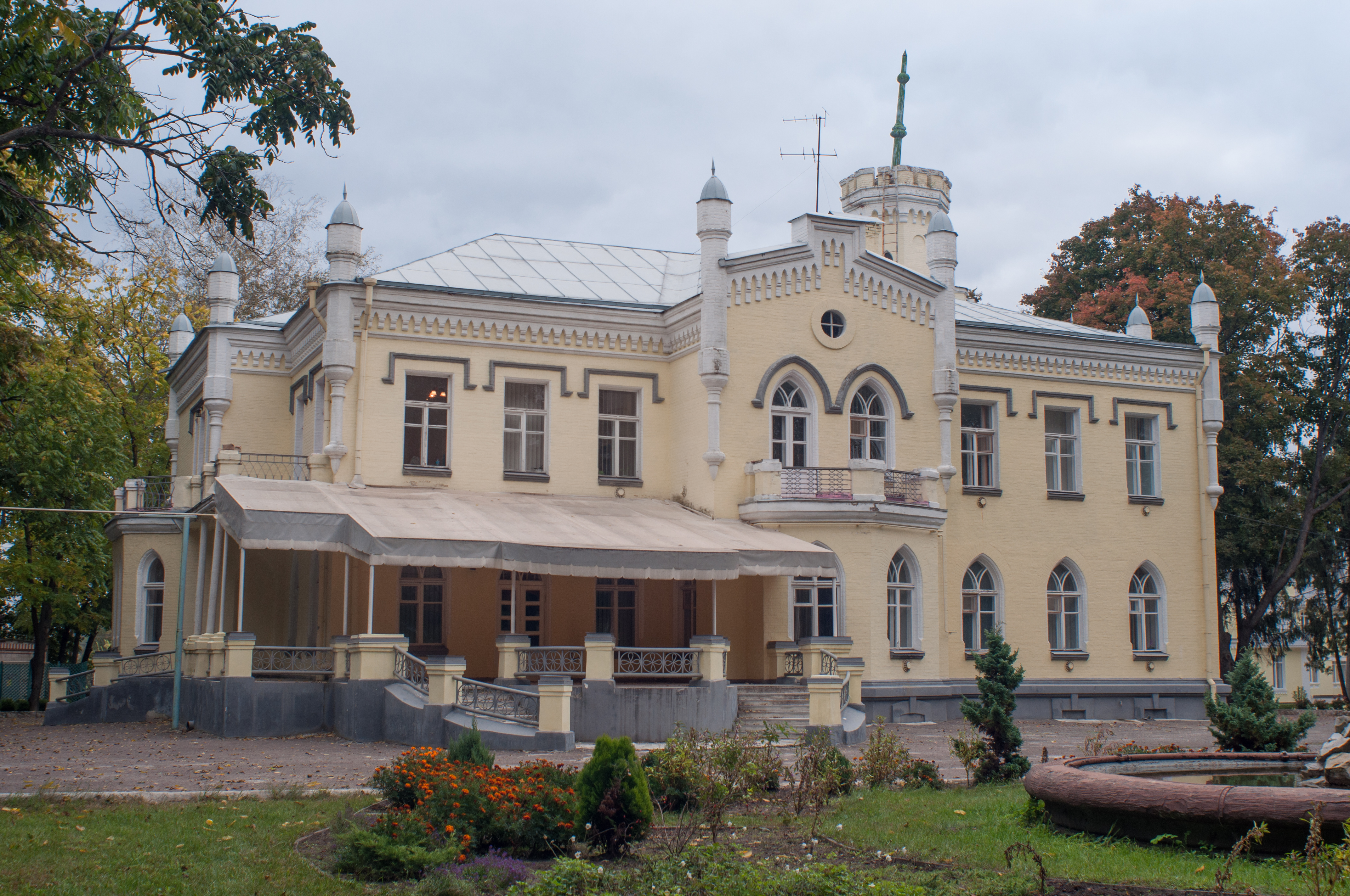 Головний будинок Садиби Штеричевої в Басах (мур.), Суми, вул. Санаторна, 1